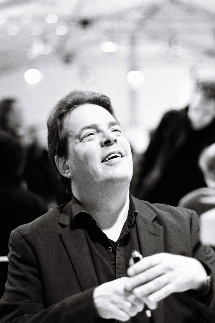 Douglas Kennedy au salon du livre Radio France, 26 novembre 2011